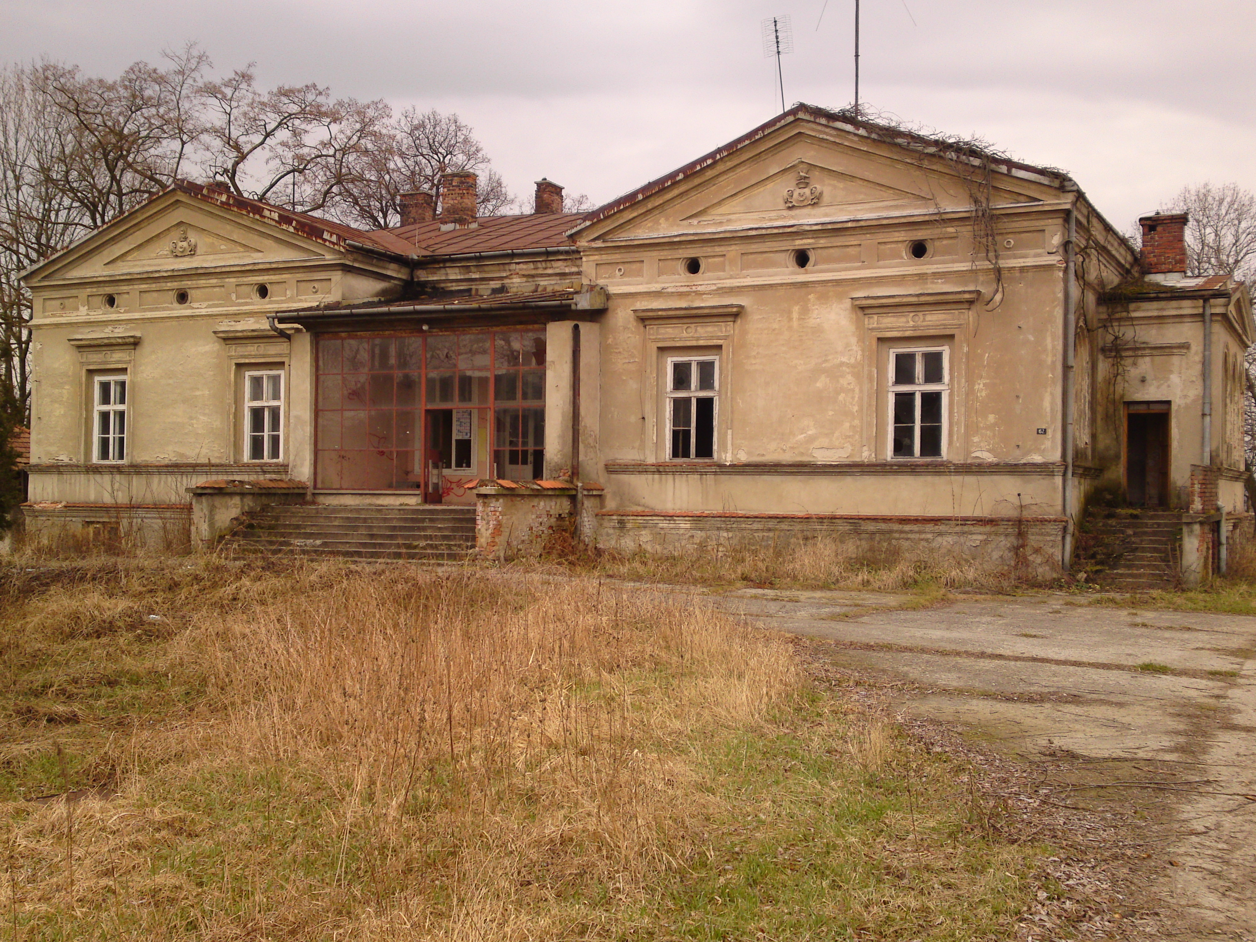 Pałac Meliniarzy w Radlnej